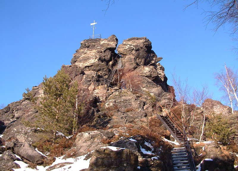 Scharfenstein